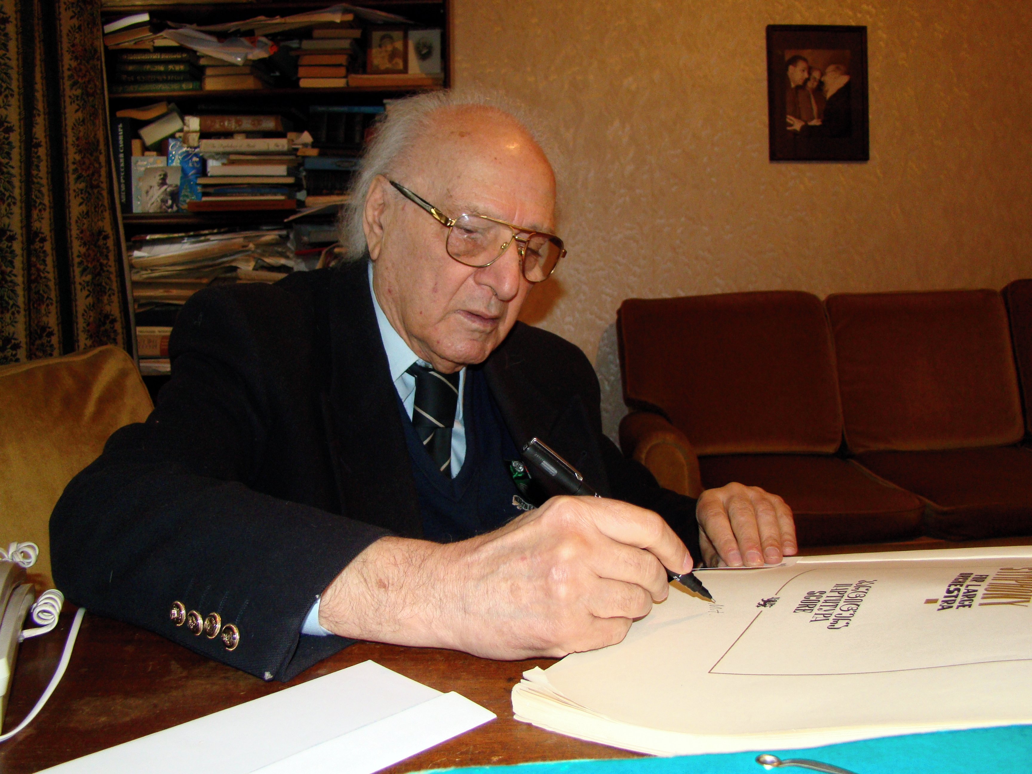 Der georgische Komponist Felix Glonti im Arbeitszimmer seiner Wohnung im "Haus der Komponisten" in Tiflis in Georgien.